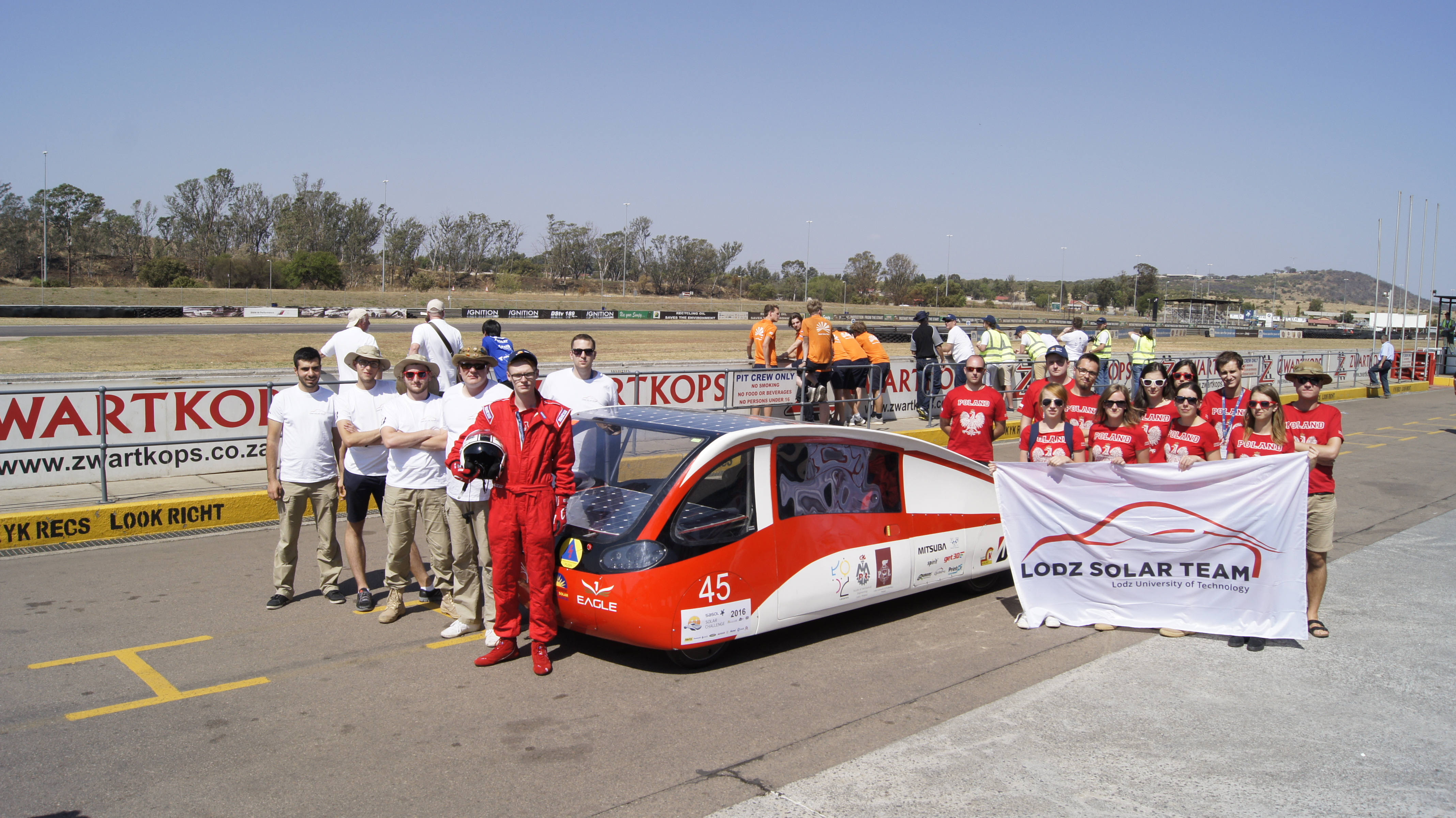 Zespół Lodz Solar Team po zakończeniu testów bolidu przed udziałem w zawodach Sasol Solar Challenge 2016.